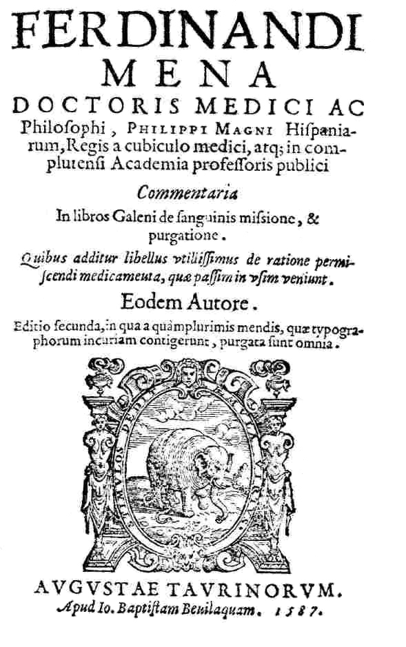 Portada del libro de Fernando de Mena: Commentaria in libros Galeni de sanguinis missione, & purgatione (2ª ed.). Turín; 1587.